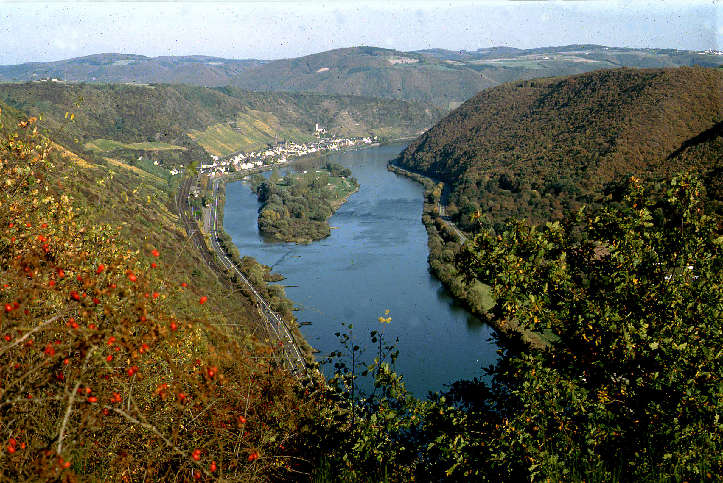 Untermosellandschaft bei Hatzenport im Herbst 1989: Blick zum Ort Hatzenport mit Weinbergsterrassen in Steillagen